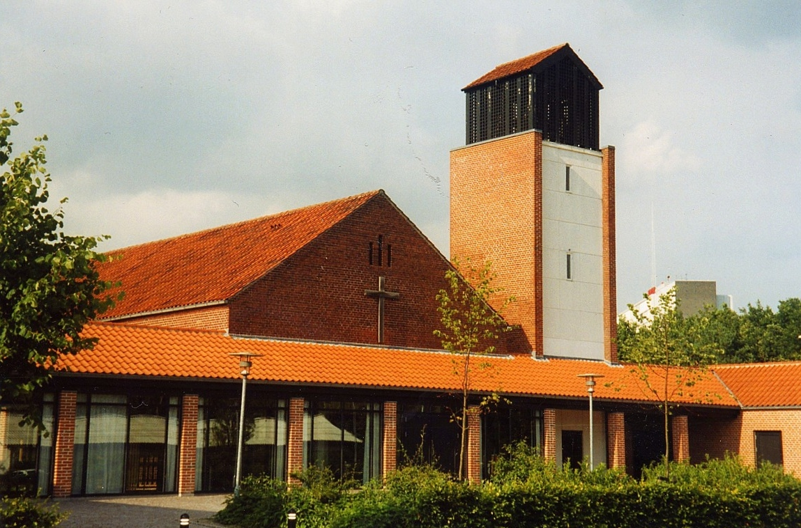 Mørkhøj Kirke, Mørkhøj Sogn, Gladsaxe Kommune